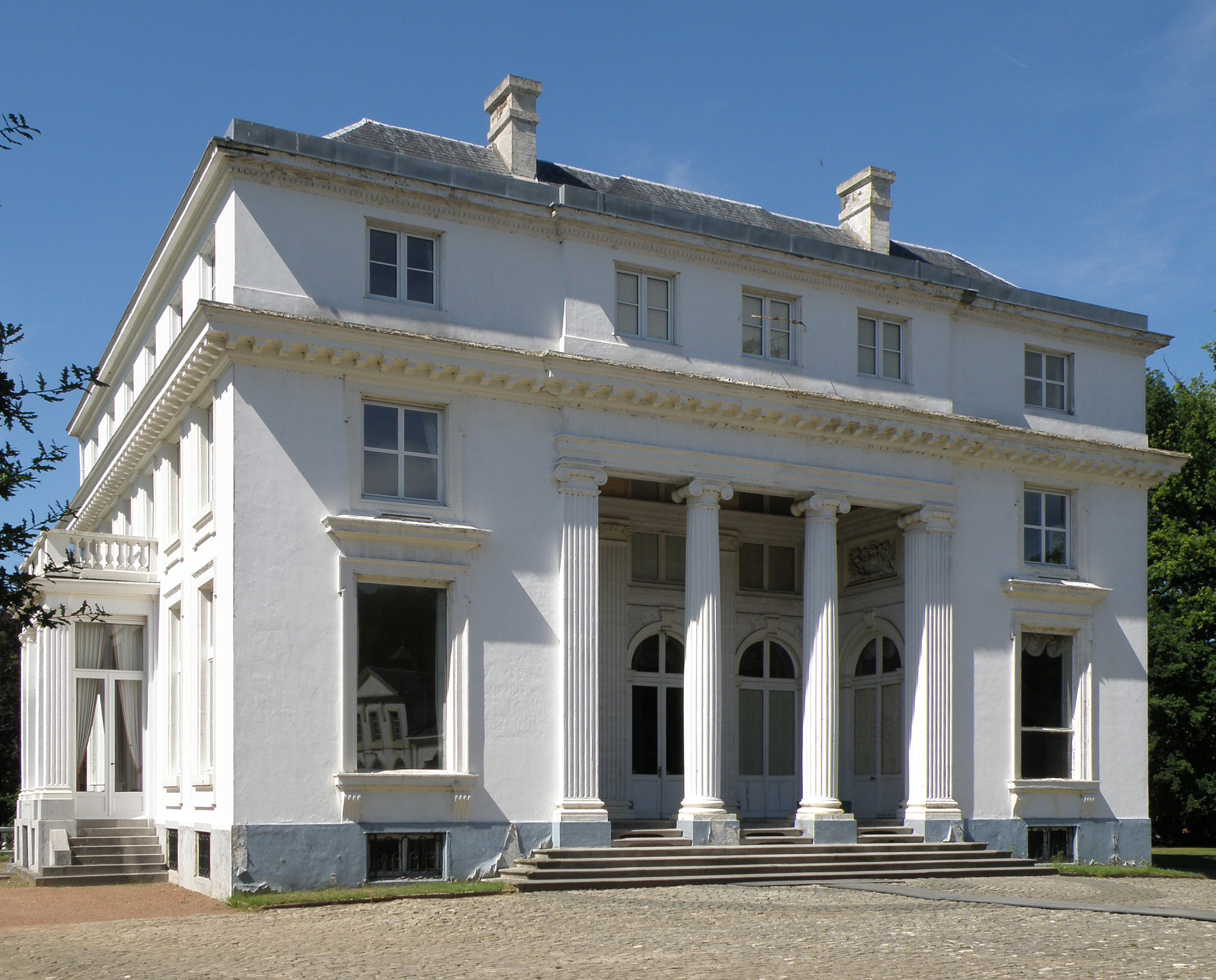 Edegem (prov. Antwerpen, België). Hof ter Linden.